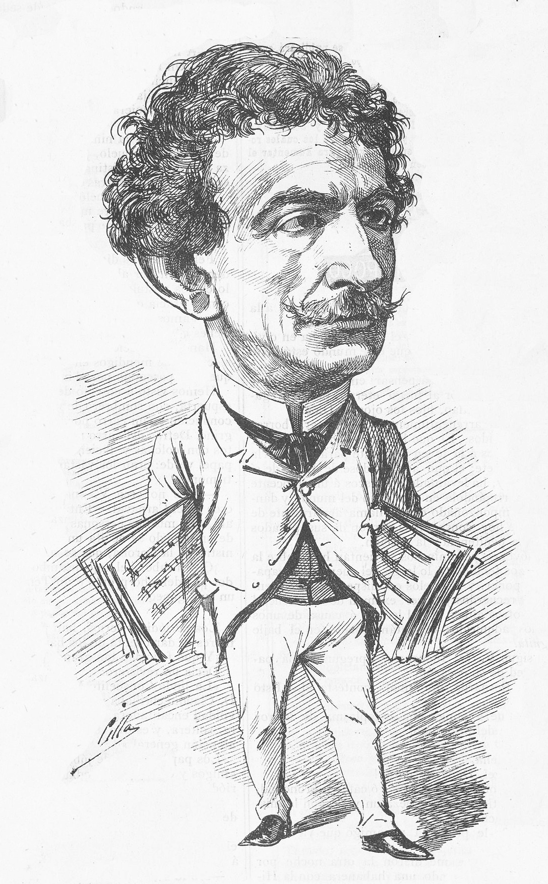 Dámaso Zabalza.